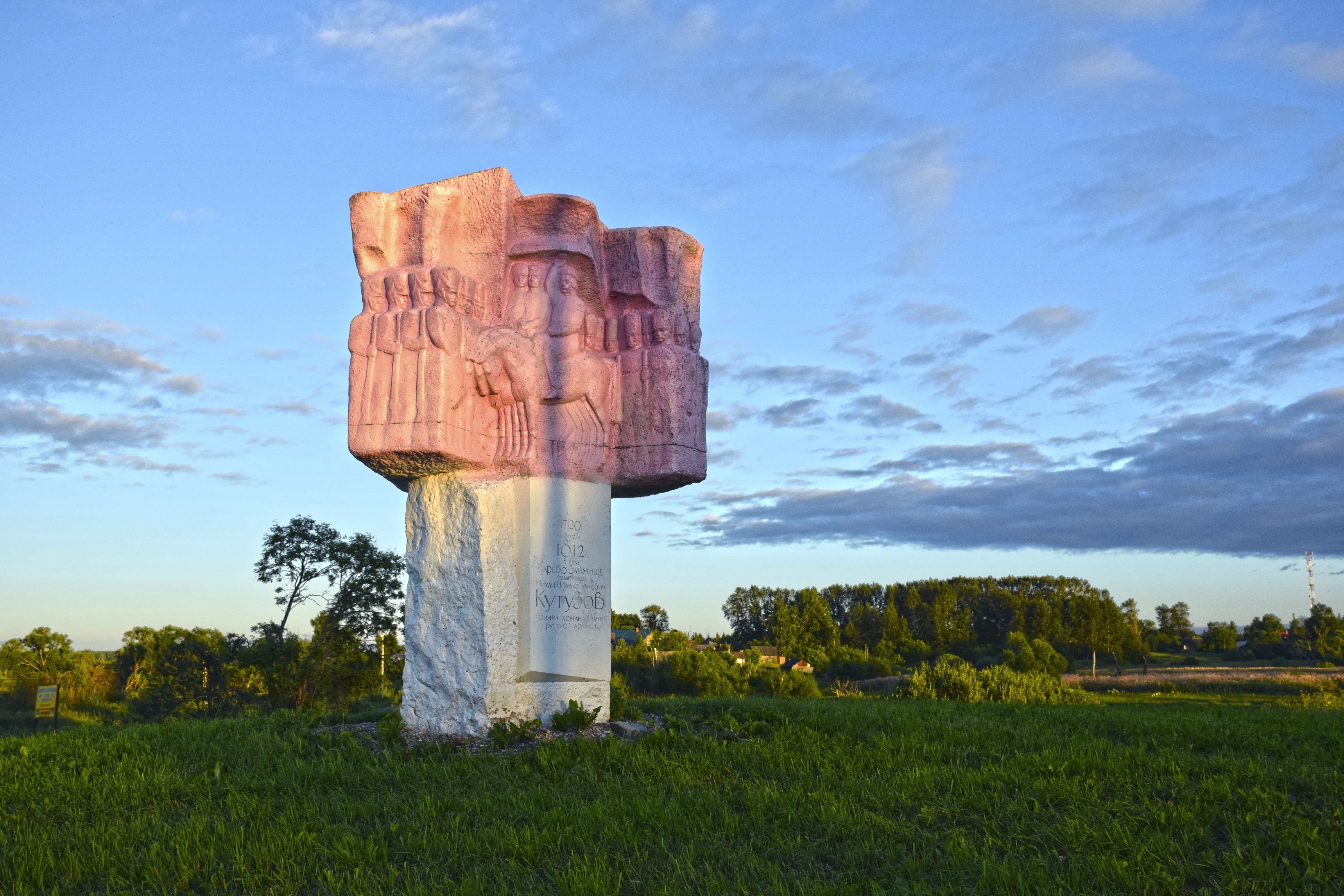 Место, где Кутузов М. И. принял командование русскими армиями. Установлен памятный знак.: Царёво-Займище, Вяземский район, Смоленская область